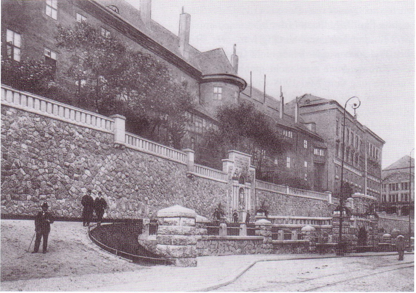 Südflügel des Königsberger Schlosses mit der neuen Terrassenanlage vor der Baumbepflanzung; am Ende der Unfriedtbau